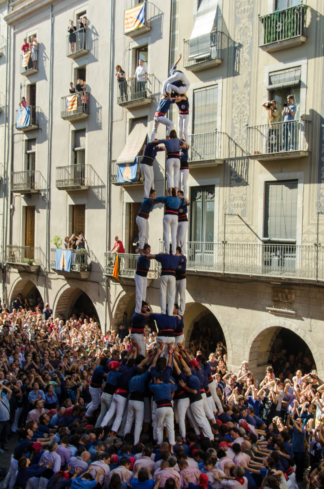 3 de 9 amb folre dels Capgrossos de Mataró a Plaça del Vi per la Diada de Sant Narcís del 2013